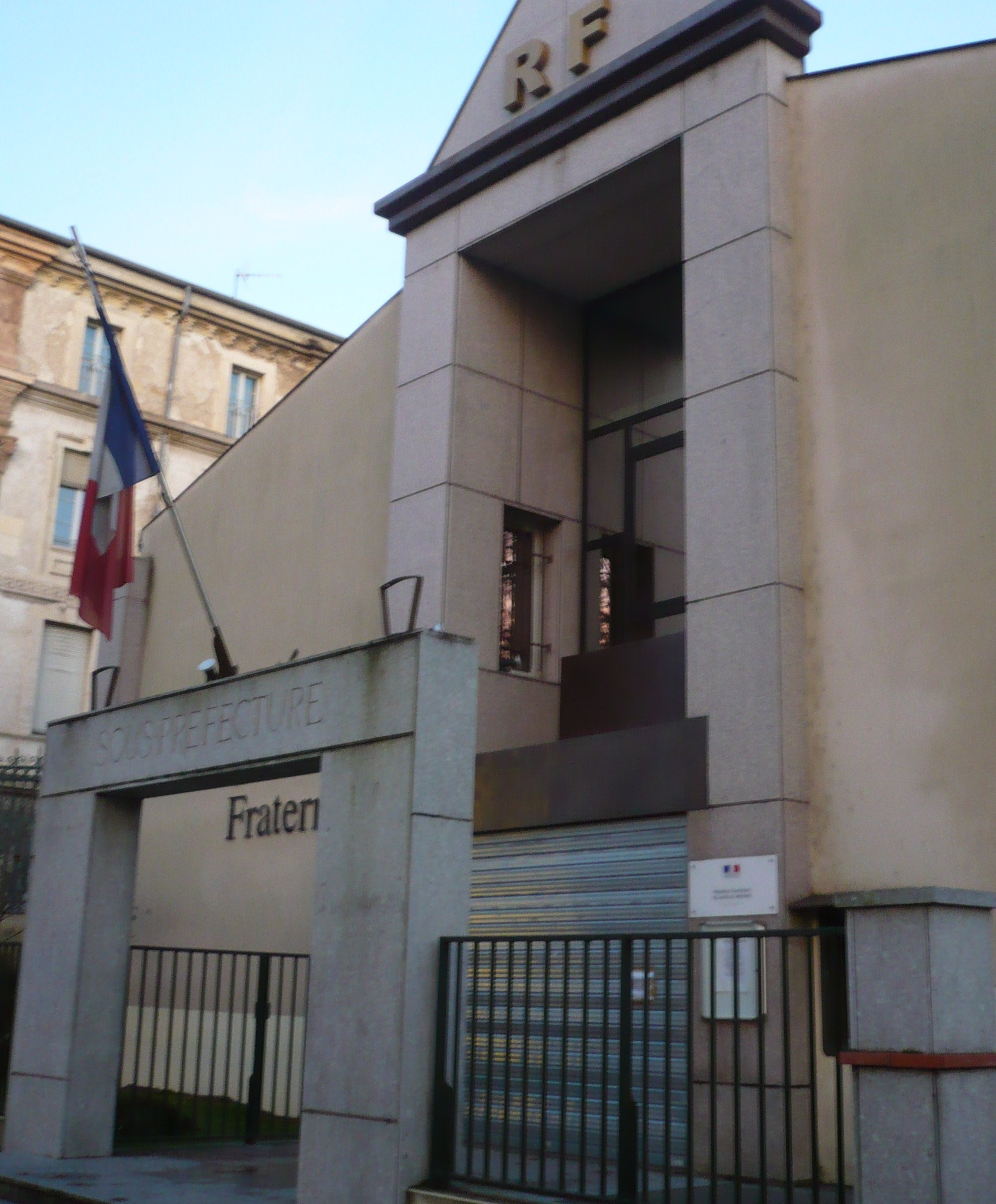 Sous-Préfecture à Castres dans le département français du Tarn.